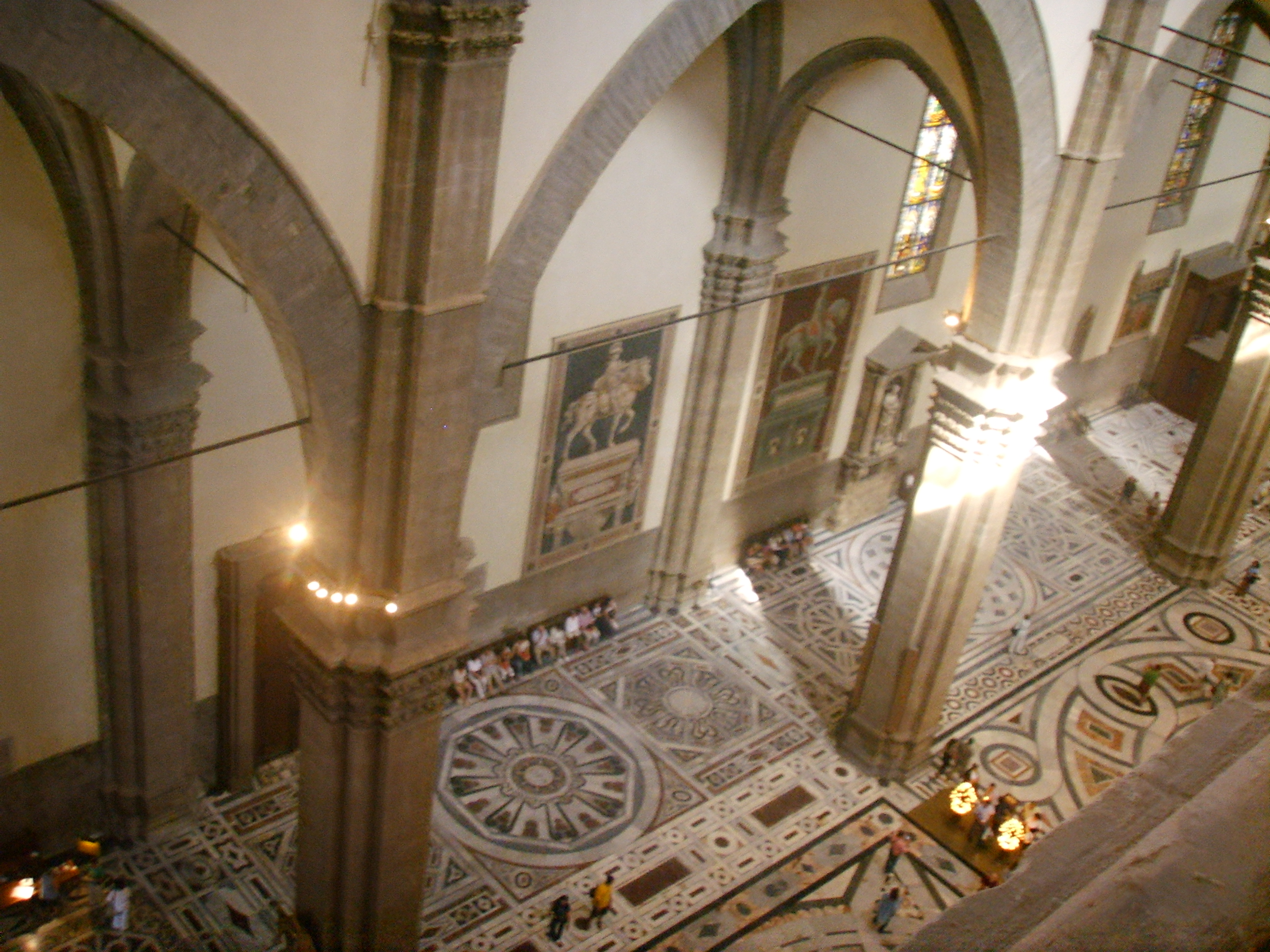 Navata centrale e di sinistra di Santa Maria del Fiore a Firenze.